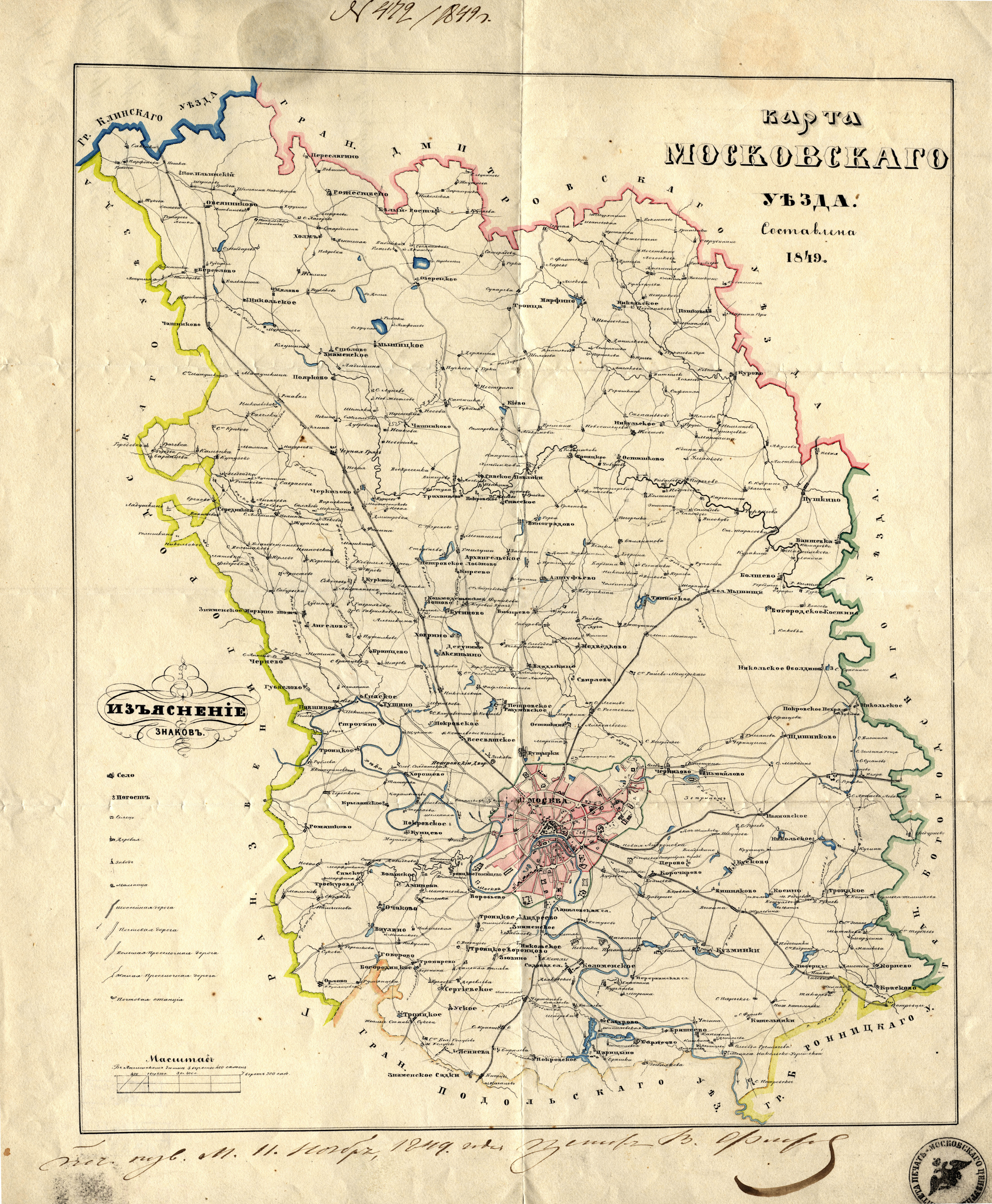 Карта Московского уезда. Составлен в 1849 году.